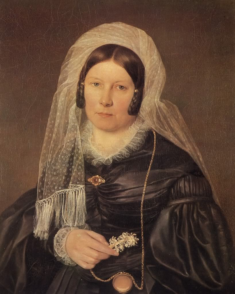 Екатерина Андреевна Карамзина, ур. Колыванова (1780-1851), жена историка Н.М.Карамзина